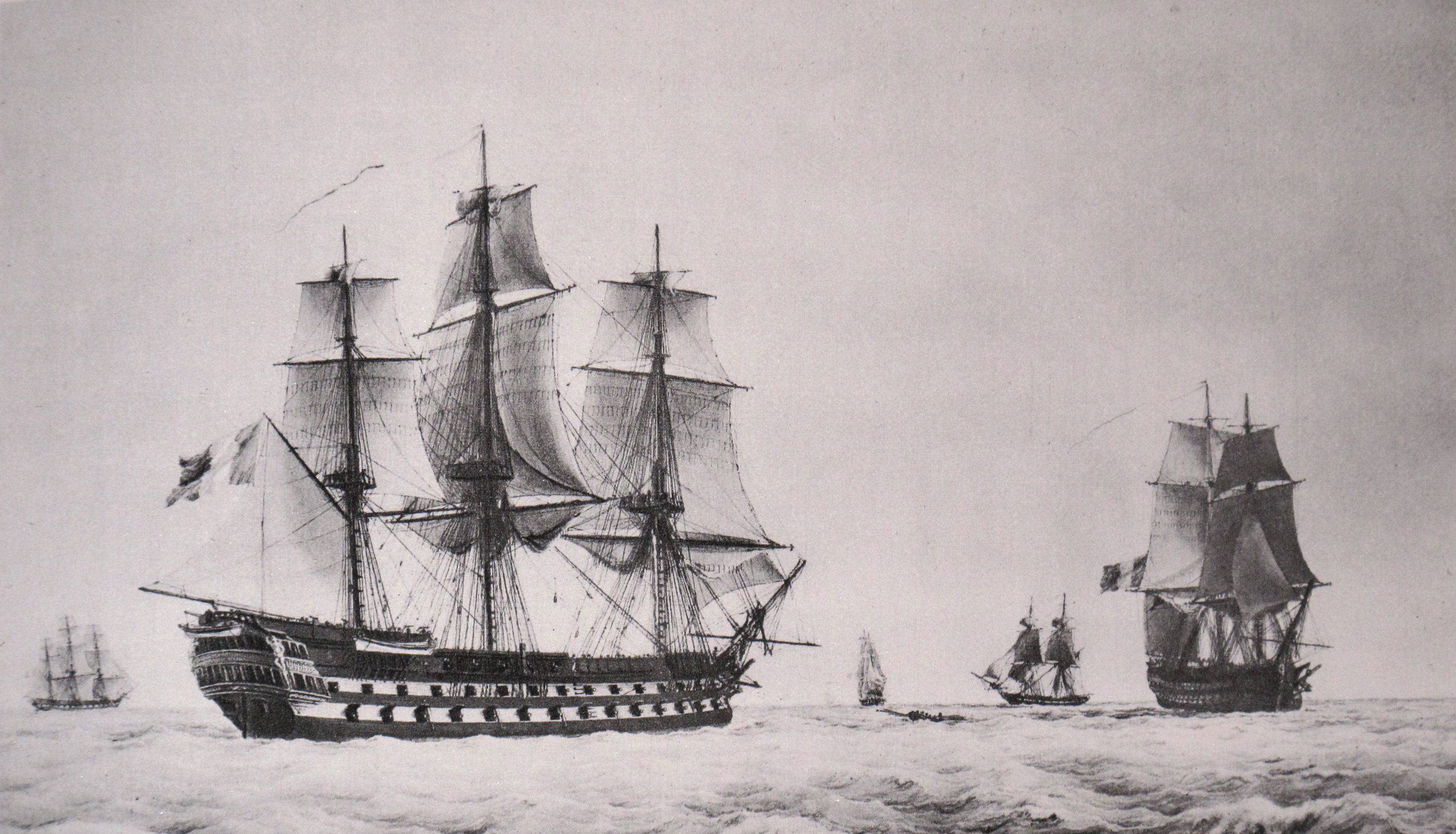 French ship Ville de Marseille